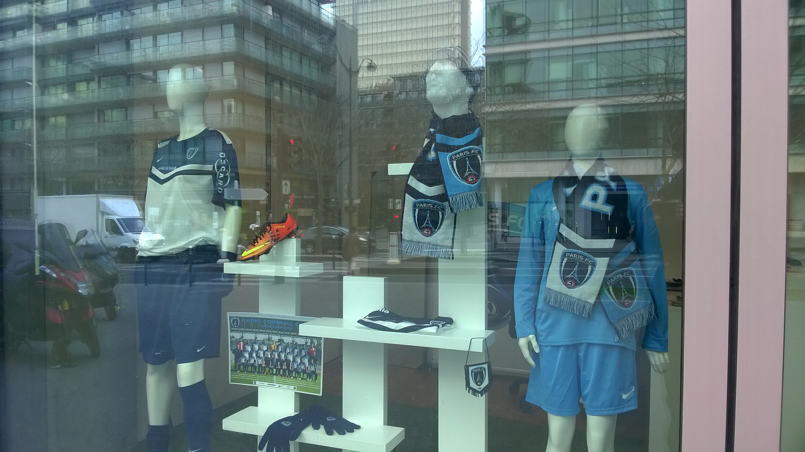 Maillots du Paris FC dans la boutique du club